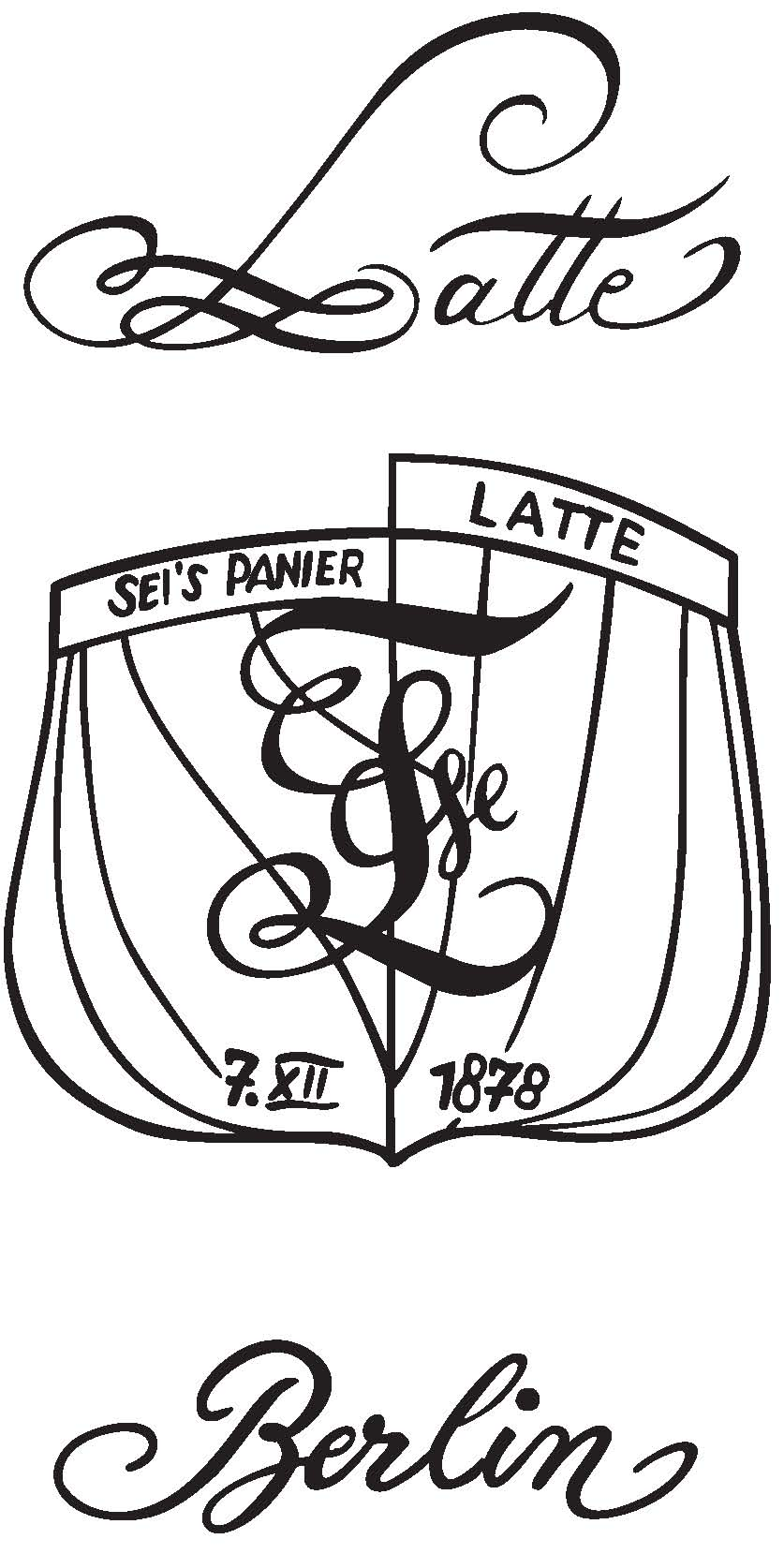 Zeichen der Berliner Latte